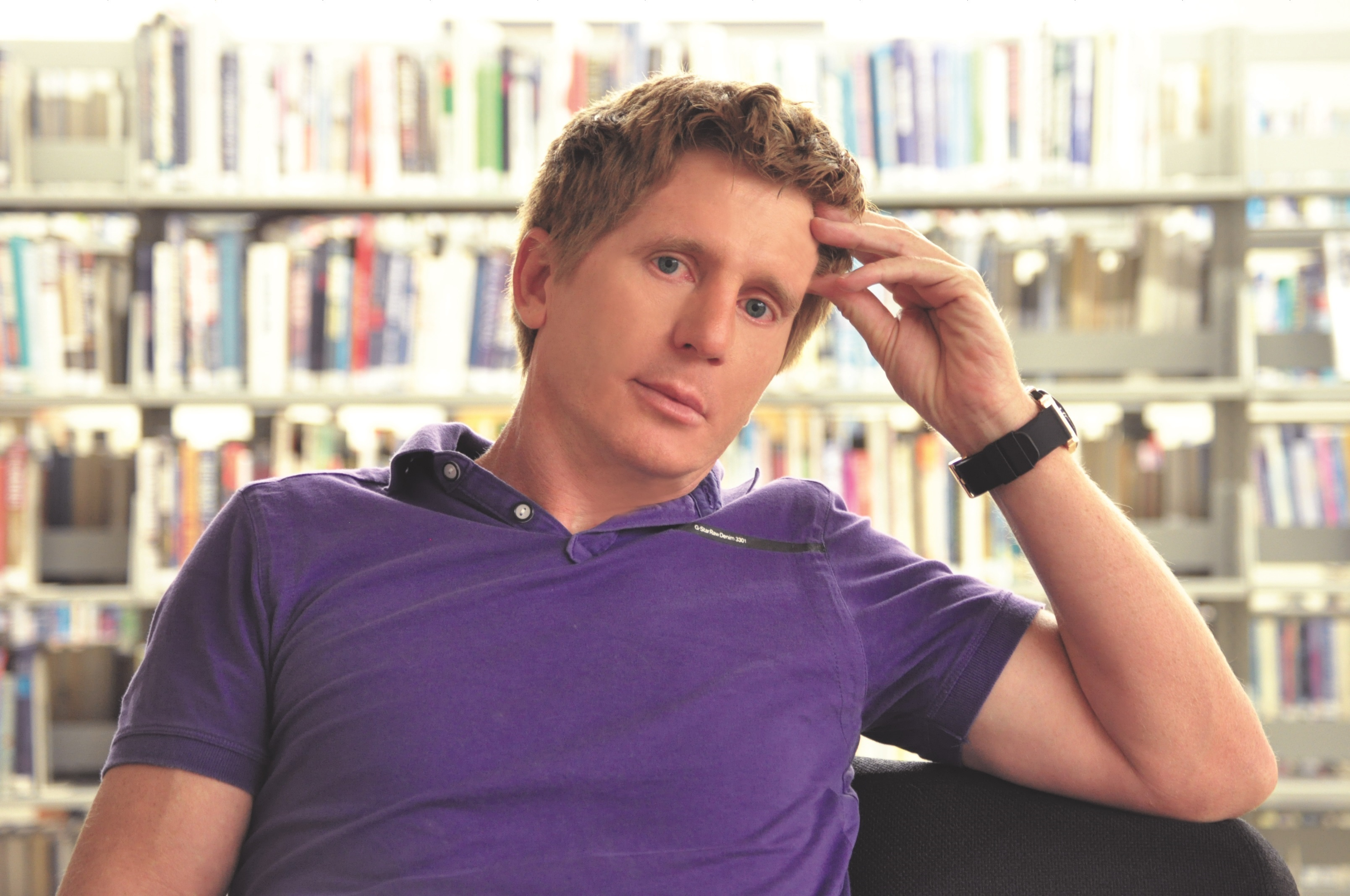 Foto recente de rosto autor Jacob Petry